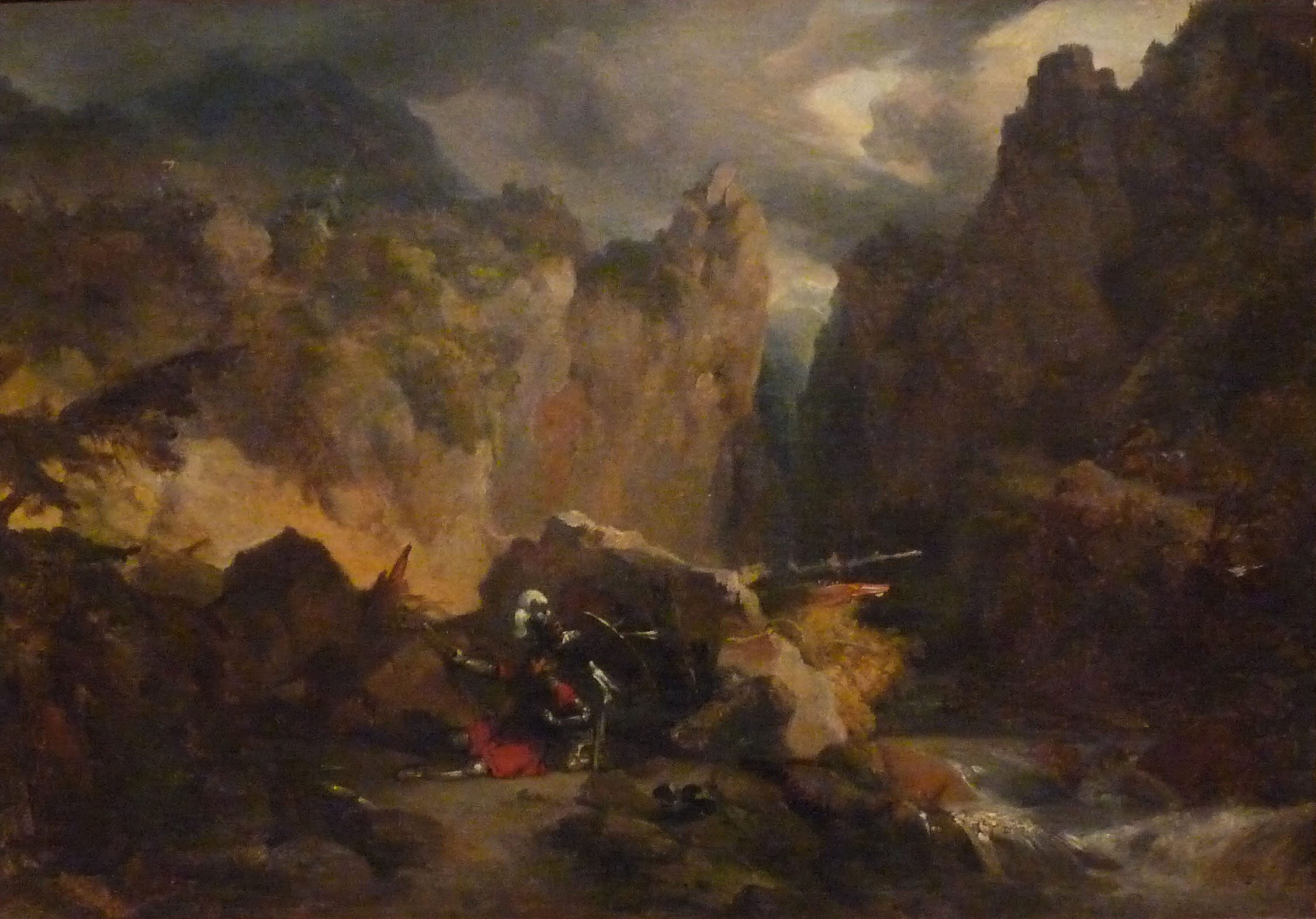 Paysage avec la mort de Roland (esquisse)